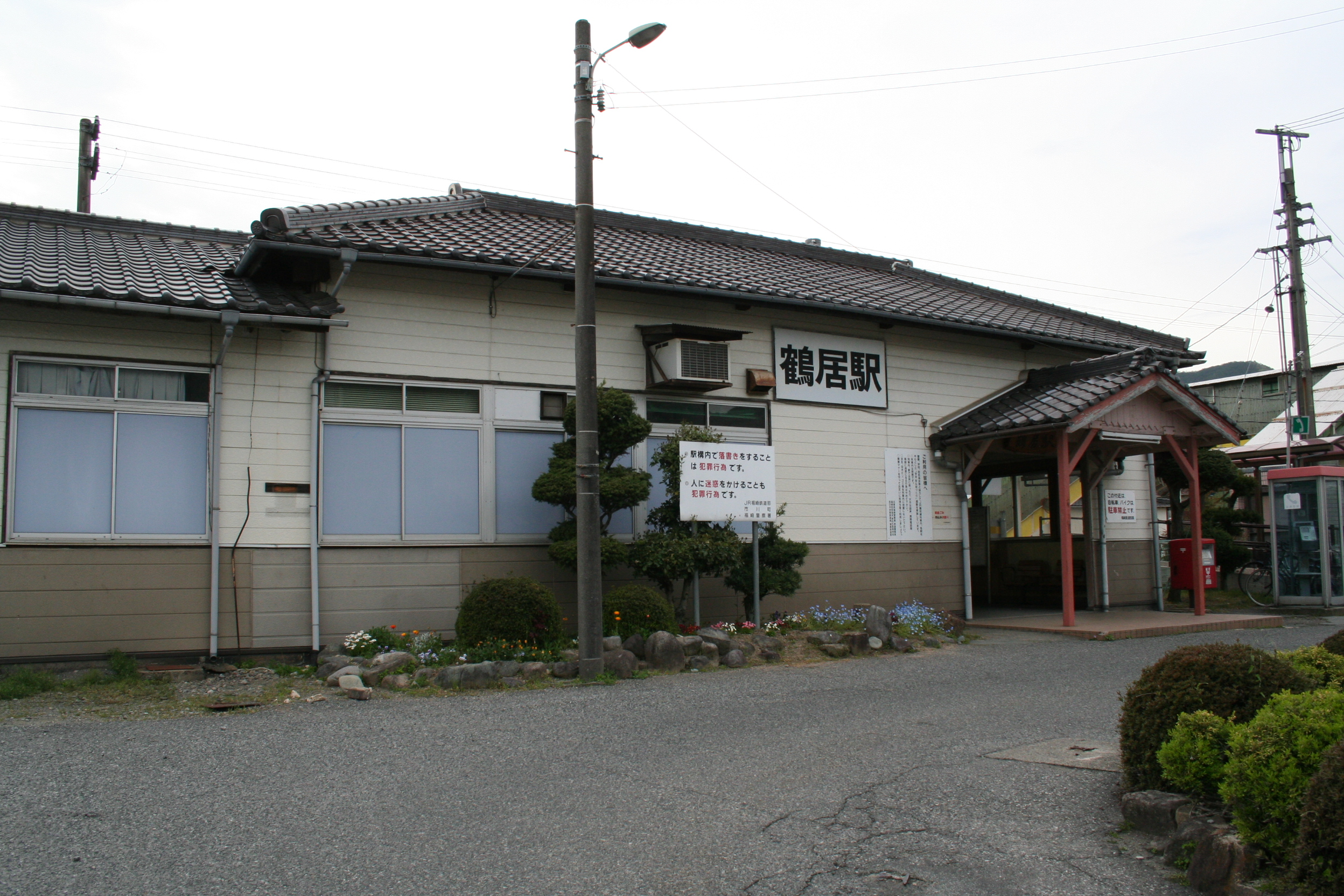 鶴居駅。JR西日本の鉄道路線の一つ、播但線にある鉄道駅。 駅舎。